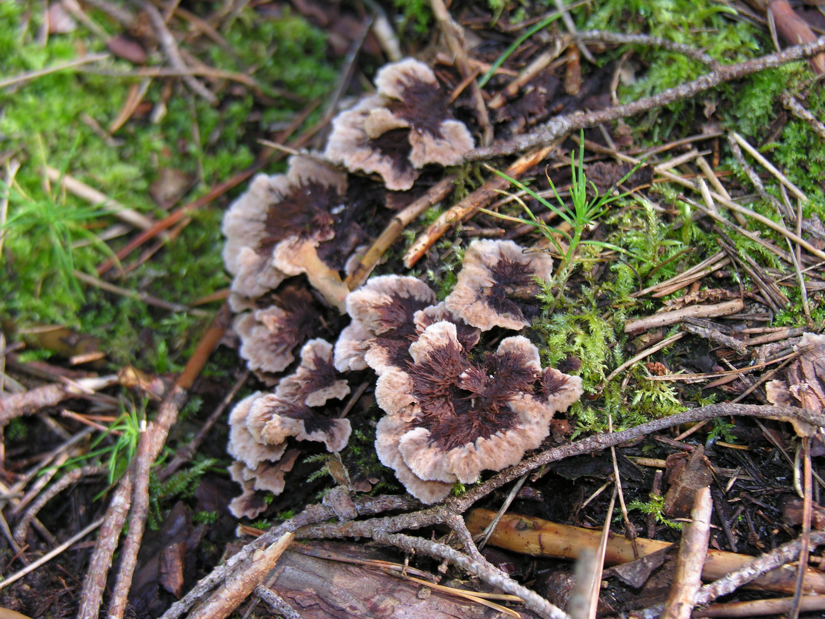 Erdwarzenpilz (Thelephora terrestris Ehrh.), Lithuania